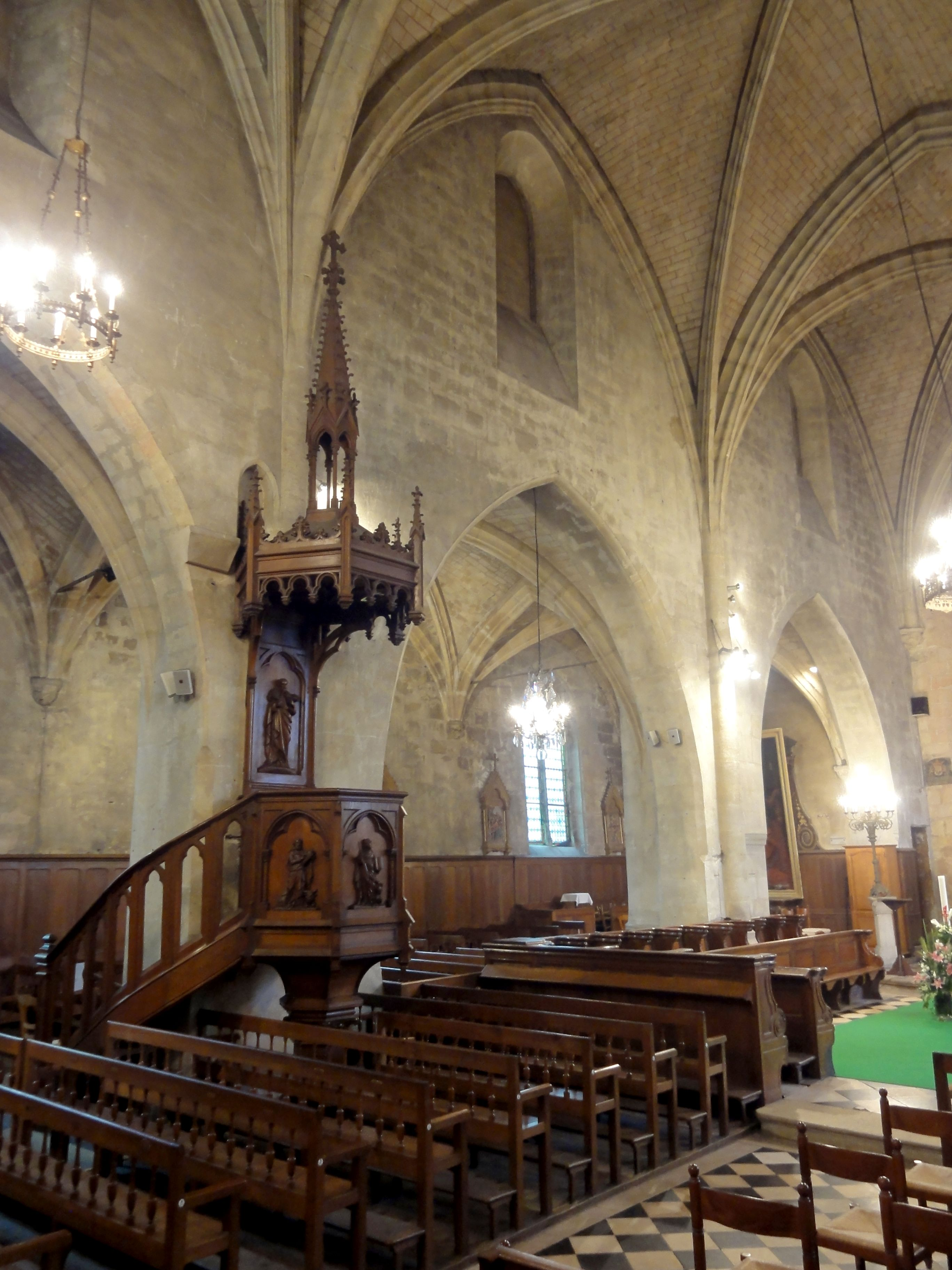 Vaisseau central, élévation nord.